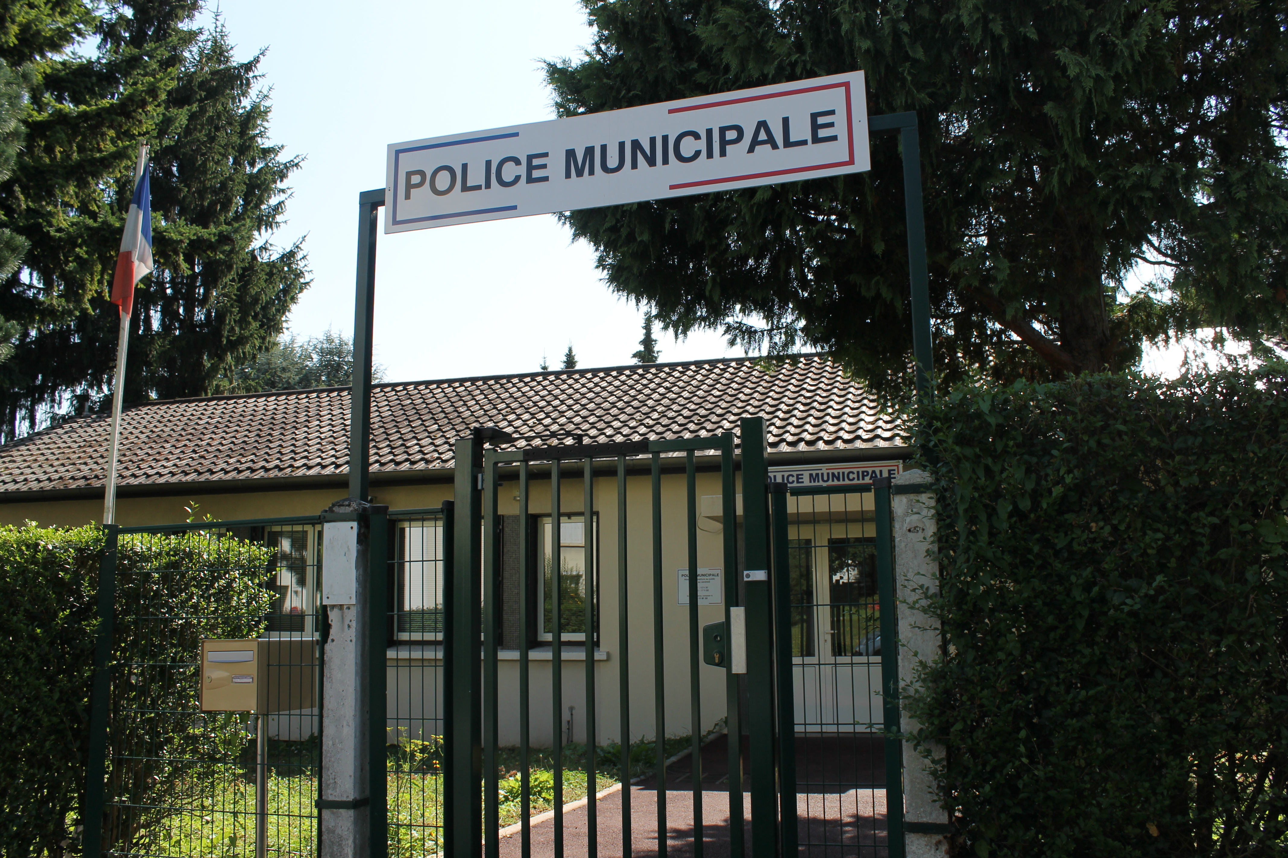 Poste de police municipale de Domont